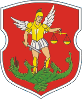 Беларуская (тарашкевіца): Герб Смаленску часоў Вялікага Княства Літоўскага